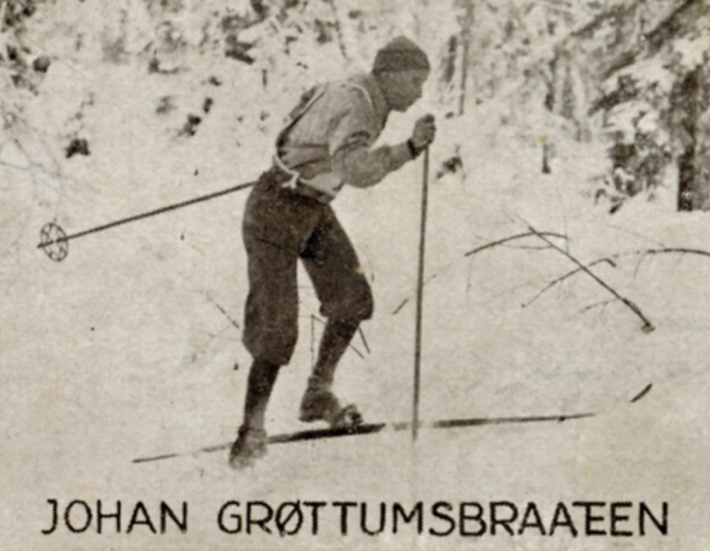 Format: Samlekort Dato / Date: ca. 1930 (dokumentet) Fotograf / Photographer: Ukjent Wikipedia: Johan Grøttumsbråten (1899 - 1983) Eier / Owner Institution: Trondheim byarkiv, The Municipal Archives of Trondheim Arkivreferanse / Archive reference: Sportsklubben Freidig: Sigarettfoto ca. 1930 (Løpenr. 75) F23942 Tekst på baksiden: Johan Grøttumsbraaten præsterte som bekjendt det enestaaende i de Olympiske lekes vinterstevne at erobre Guldmedaljen i kombinert skirend og det ordinære langrend over 18 km. Merknad: Disse samlekortene med bilder av norske og internasjonale idretthelter fulgte med i sigarettpakker på 1920 og 30-tallet - derav tobakksreklamen på baksiden. Samlekortene kommer fra Sportsklubben Freidigs arkiv, og inneholder nærmere 90 unike kort pent plassert i et samlealbum. Samleren var den senere skipsmegler Finn Følling (1914 – 1985).